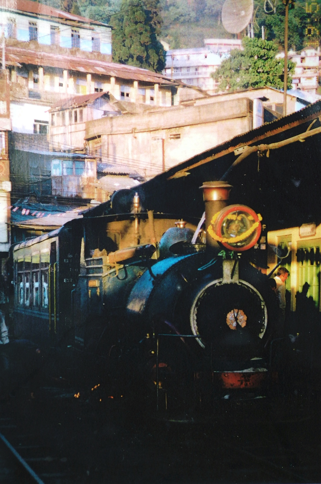 Darjeeling Himalayan Railway, दार्जिलिंग-हिमालय ダージリンヒマラヤ鉄道 1999年 同日の動画,1 同日の動画,2 撮影：松岡明芳